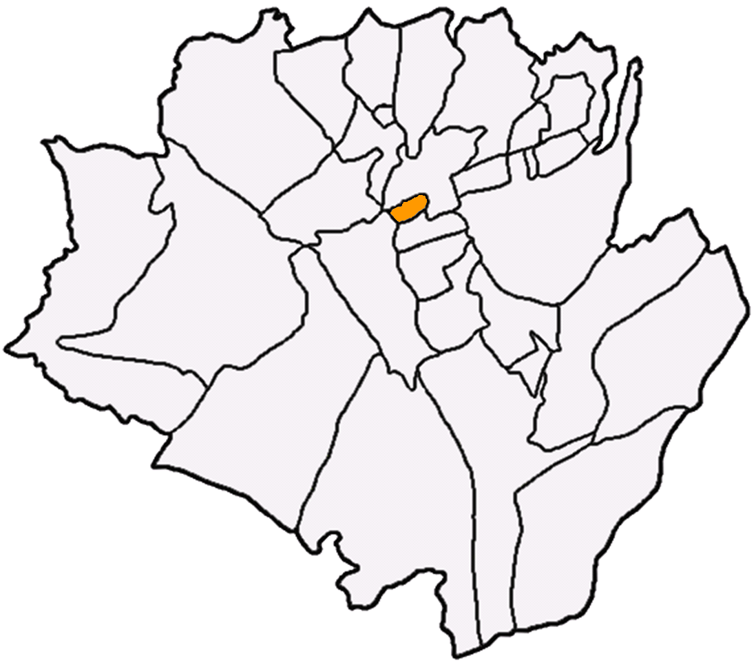 龍潭里在龍潭區 (台灣)中的位置